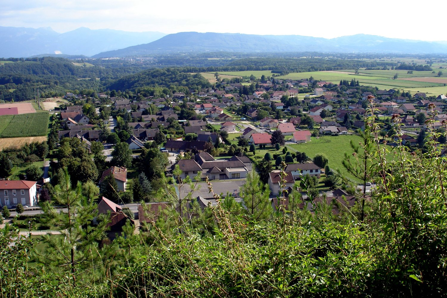 Apprieu, vue vers le Sud-Ouest.